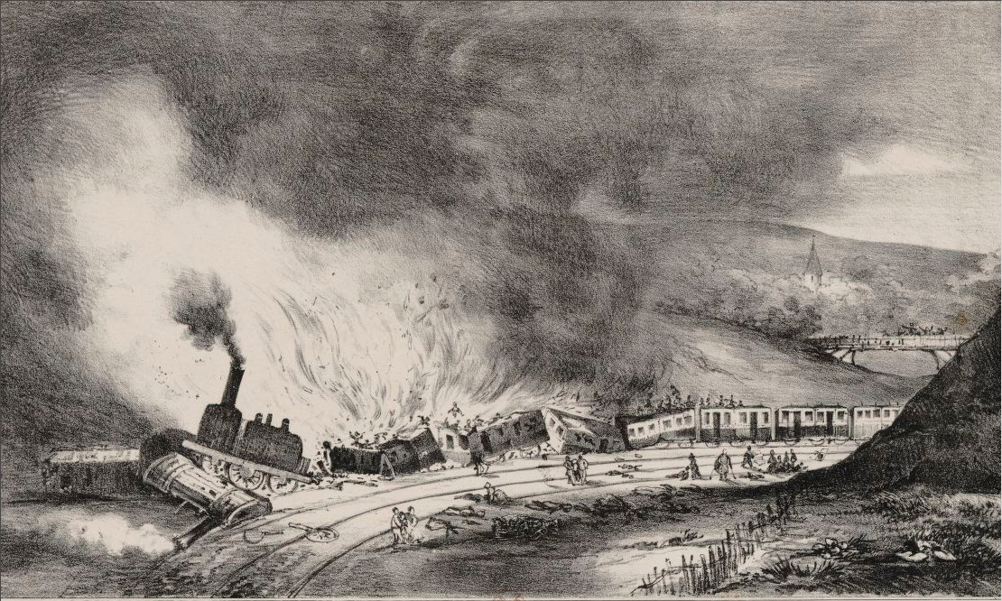 Titre : 8 mai 1842 : [estampe] : Accident sur le chemin de fer de Versailles, Rive gauche Éditeur : [s.n.] Type : Scènes historiques -- 1800-1869,image fixe,estampe Format : 1 est. : lithographie Format : image/jpeg Droits : domaine public Identifiant : ark:/12148/btv1b8414950k Source : Bibliothèque nationale de France, département Estampes et photographie, RESERVE QB-201 (169)-FOL Relation : Notice de recueil : Relation : Appartient à : [Recueil. Collection Michel Hennin. Estampes relatives à l'Histoire de France. Tome 169, Pièces 14745-14807, période : 1841-1851] Relation : Description : Référence bibliographique : Hennin, 14759 Provenance : bnf.fr